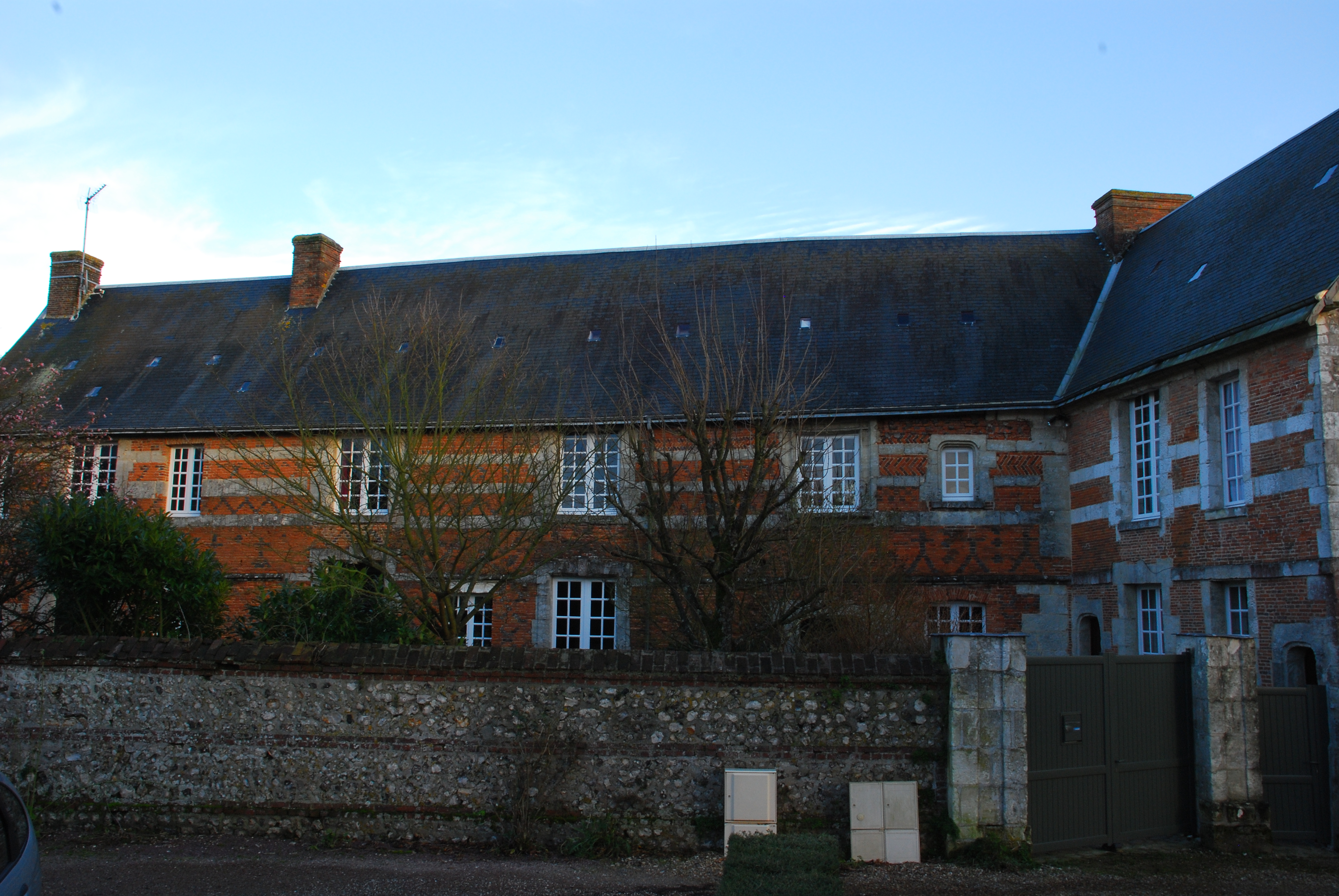 Vieux Château, Rue du Vieux Château (Inscrit, 1996) .